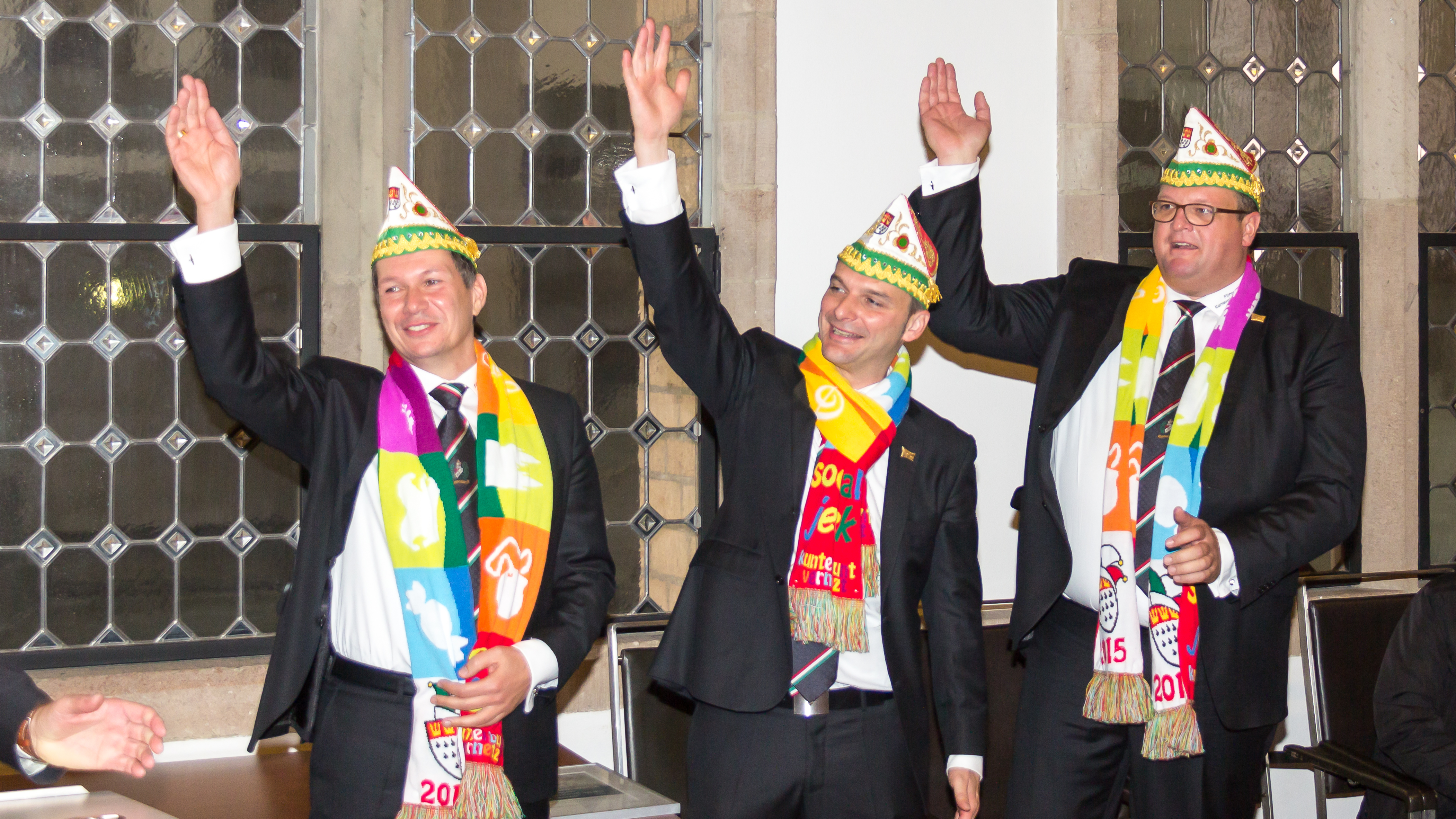 Kölner Dreigestirn vom Flittarder KG von 1934 e.V. Vertragsunterzeichnung des Sessionsvertrages im Senatssaal und Empfang durch den Oberbürgermeister im Hansasaal des Historischen Rathauses von Köln Foto: Jungfrau Alexandra (Sascha Prinz), Prinz Holger I. (Holger Kirsch), Bauer Michael (Michael Müller)